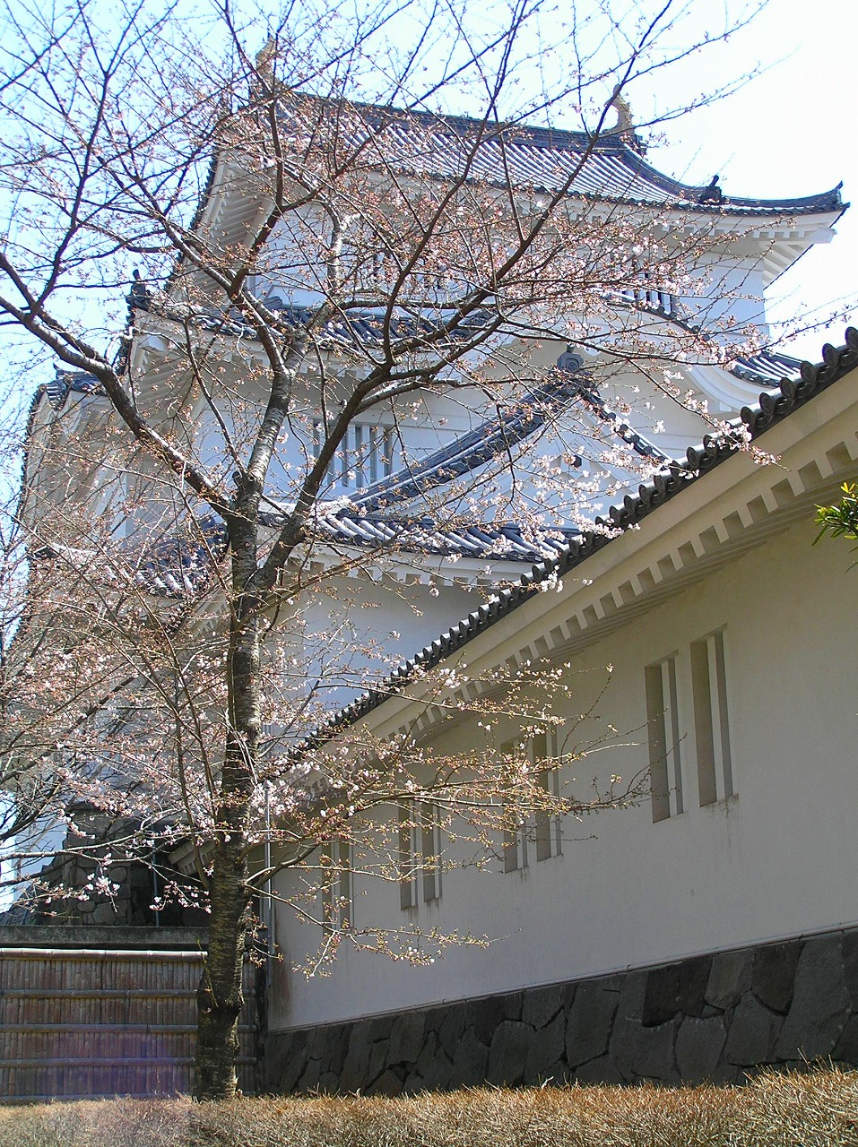 サクラ咲く頃の大多喜城